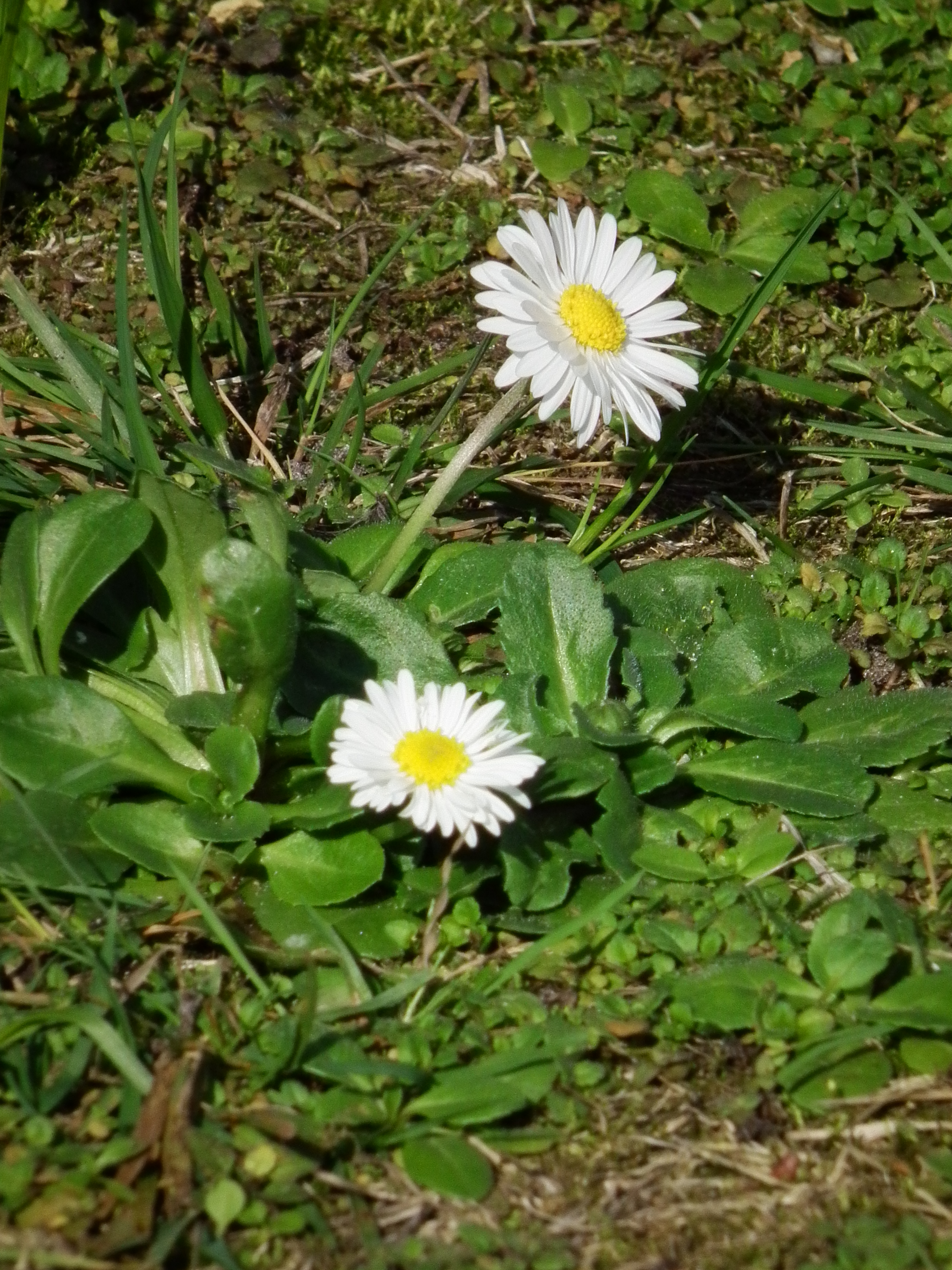 Gänseblümchen (Bellis perennis) auf der ostfriesischen Nordseeinsel Juist (Niedersachsen, Deutschland)